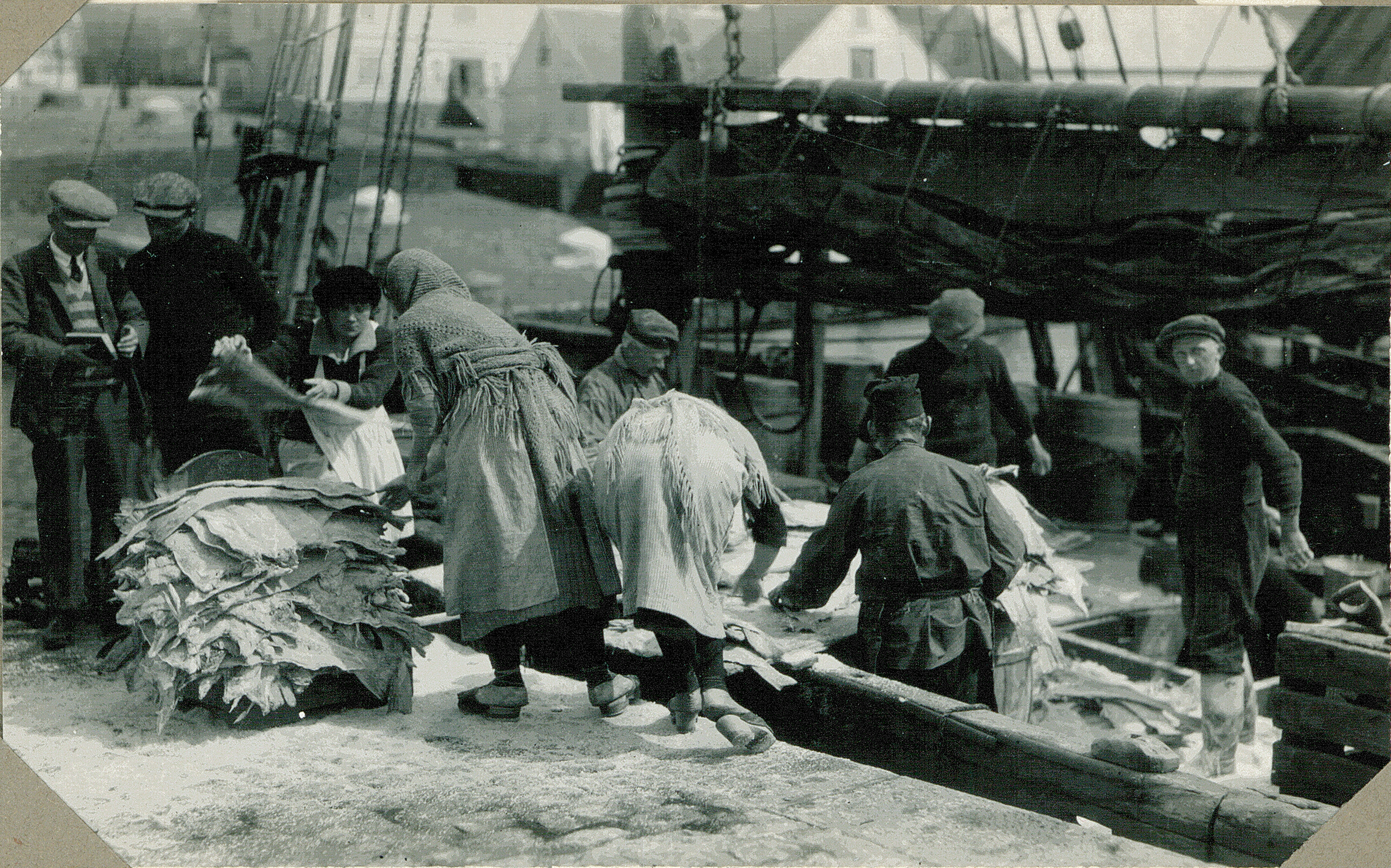 Fotografiet sidder i et fotoalbum lavet af Sophie Petersen med titlen "Færøerne". Fotoalbummet har nummer F5, og indgår i Det Kongelige Danske Geografiske Selskabs arkiv som af resultat af samarbejde mellem Etnografisk Samling og selskabet siden 2010 har været opstillet på Nationalmuseet som et selvstændigt arkiv. Arkivet er administreret af Etnografisk Samling. Det Kongelige Danske Geografiske Selskab har eksisteret siden det blev grundlagt 18. november 1876. Dets formål var at medvirke til “så vel at fremme kendskabet til jorden og dens beboere som at udbrede interessen for den geografiske videnskab” I arkivet findes blandt andet breve, dagbøger, regnskaber, kort og foredragsmanuskripter. Derudover indeholder arkivet over 70.000 fotografier.